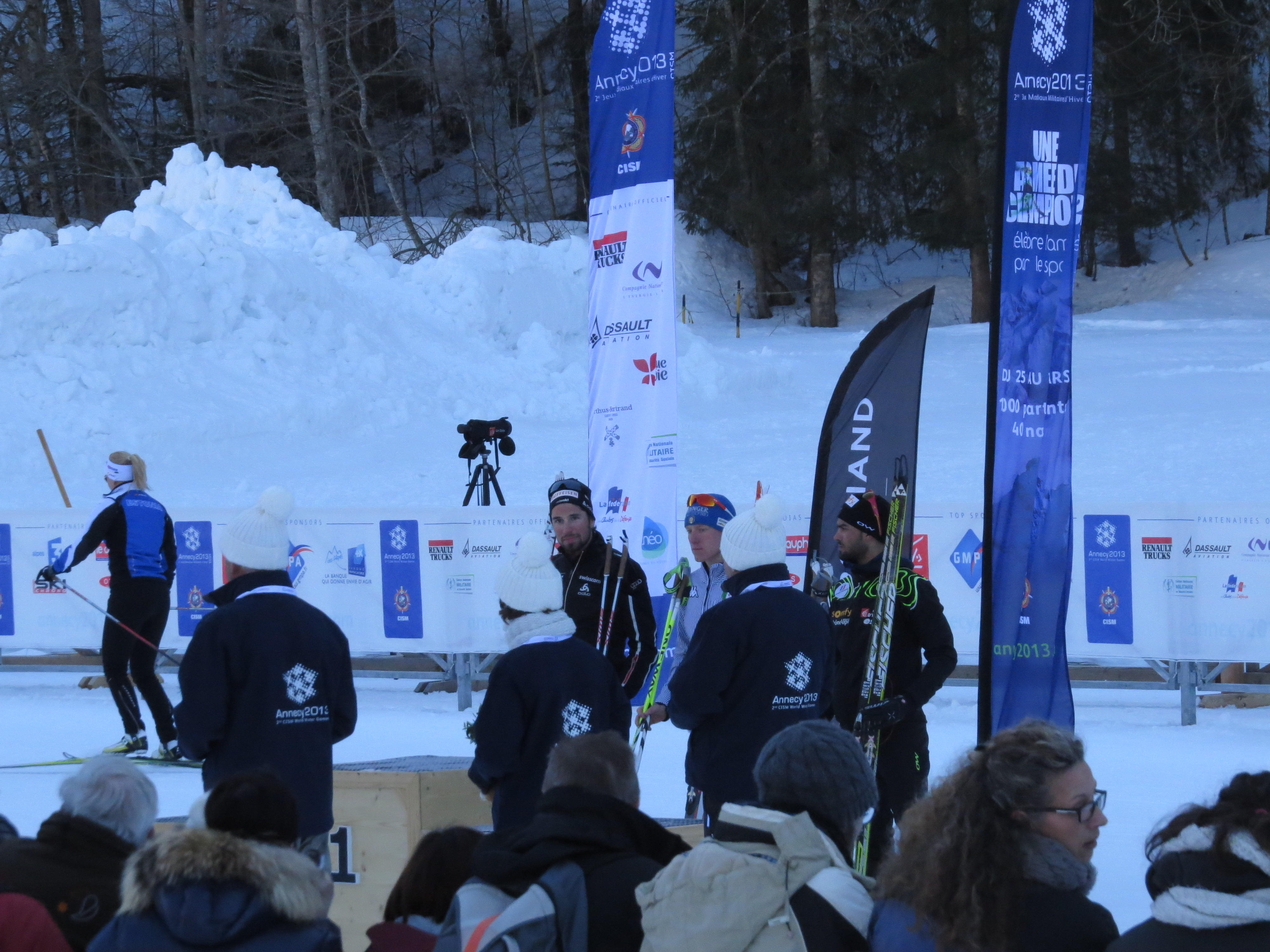 Jeux Mondiaux Militaires d'Hiver 2013 (Le Grand Bornand)